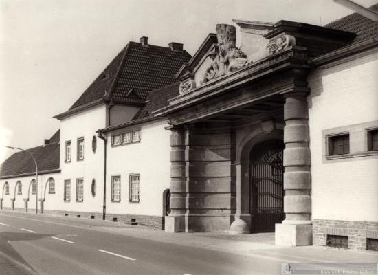 Maarhäuser-Hof in Köln-Heumar